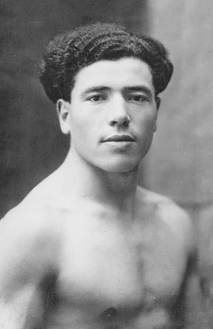 Erminio Spalla